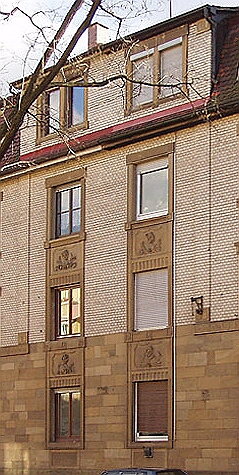 ausschnitt aus dem unten genannter Quelle